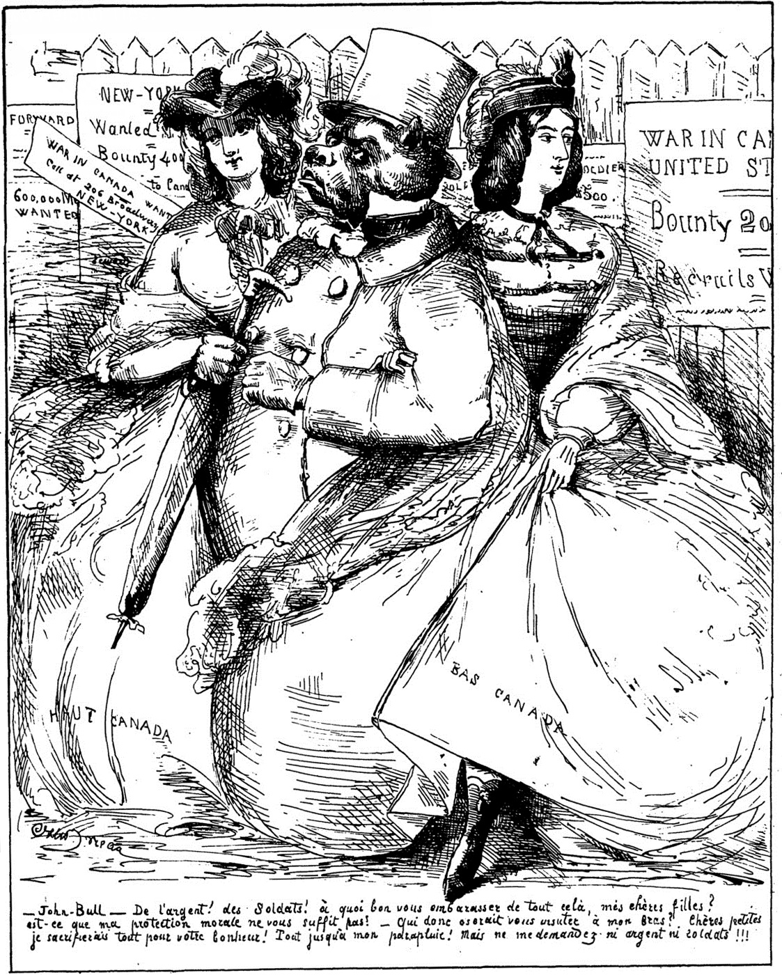 Caricature par Charles-Henri Moreau de John Bull avec ses deux « filles » Haut-Canada et Bas-Canada. Paru le 27 mai 1865 dans le journal montréalais Le Perroquet On y lit : - John Bull - De l'argent! des soldats! à quoi bon vous embar[r]asser de tout cel[à], m[é]s chères filles? est-ce que ma protection morale ne vous suffit pas? - Qui donc oserait vous [ursuter] à mon bras? Chères petites je sacrifierais tout pour votre bonheur! Tout jusqu'à mon parapluie! Mais ne me demandez ni argent ni soldats !!!